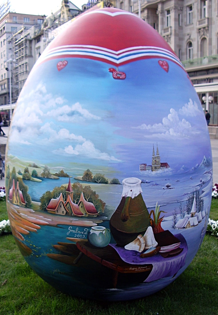 Zagrebačko uskrsno jaje na Trgu bana Jelačića